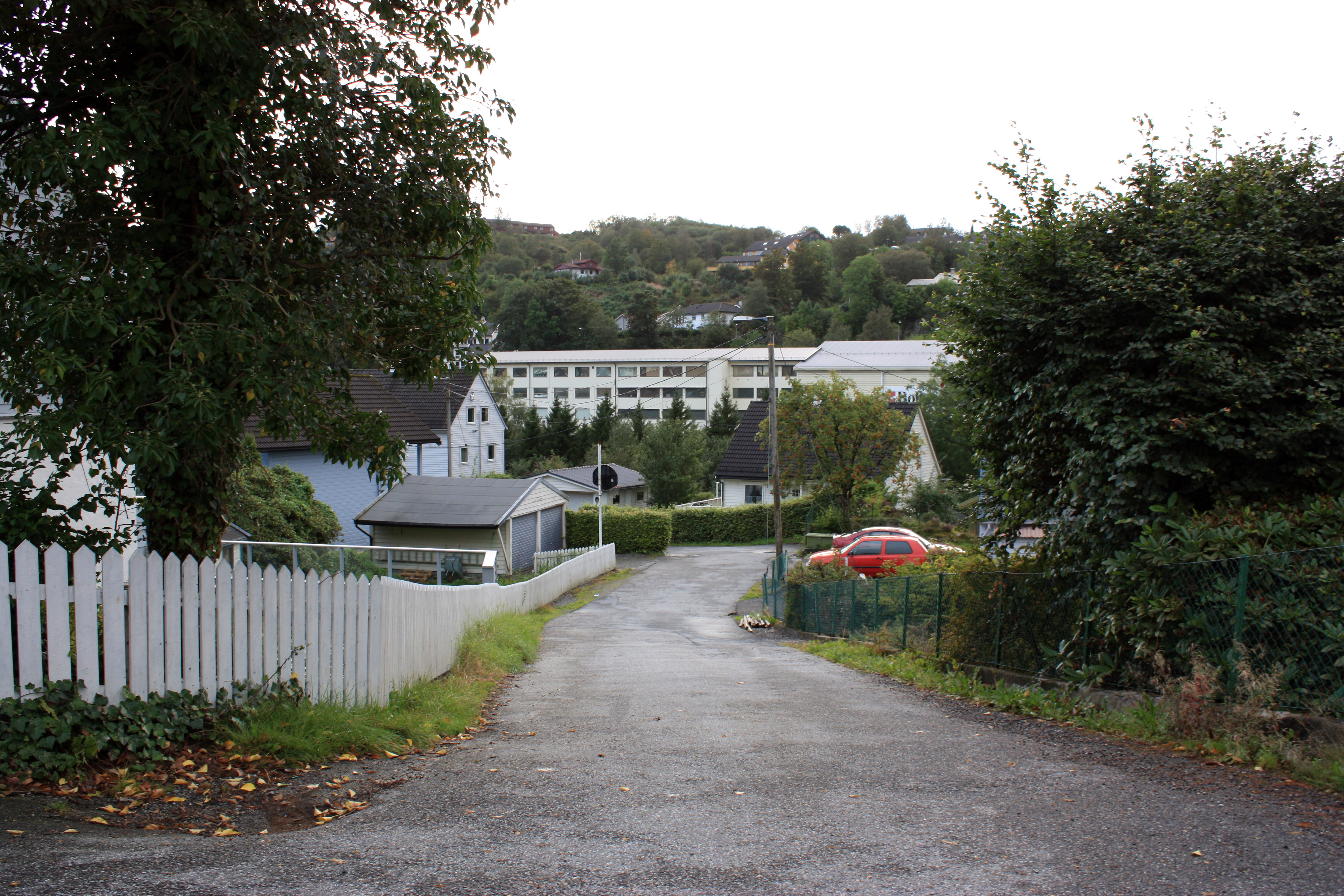 Vestre Skjoldlia, Fana, Bergen.